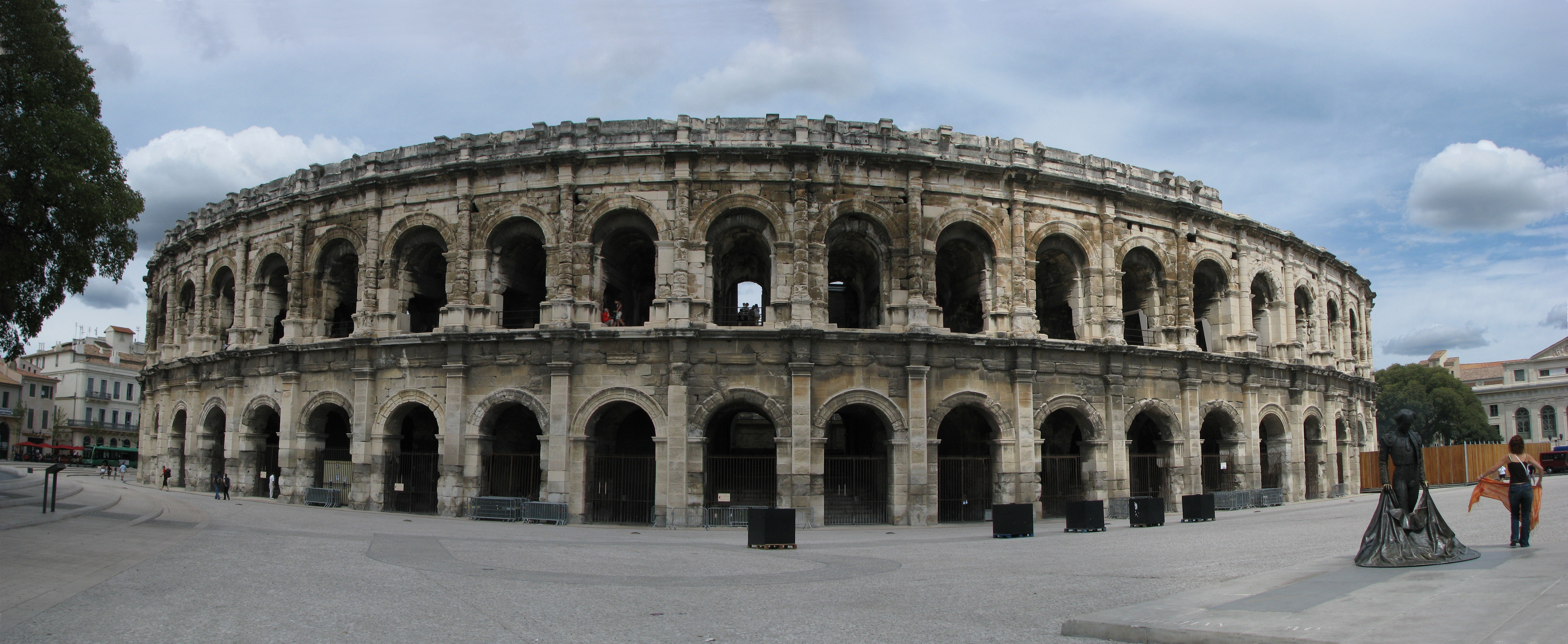 Nîmes - amphithéatre.